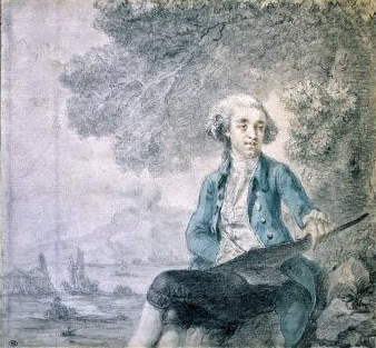 Portrait de Louis-François Cassas